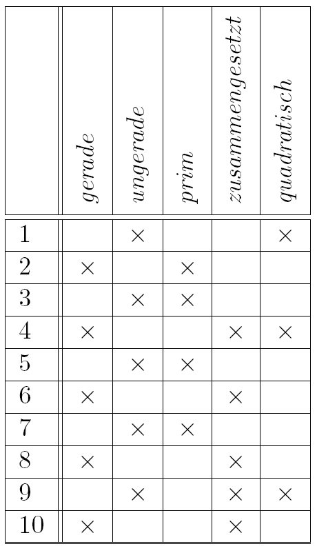 Ein formaler Kontext zu Eigenschaften der Zahlen 1-10